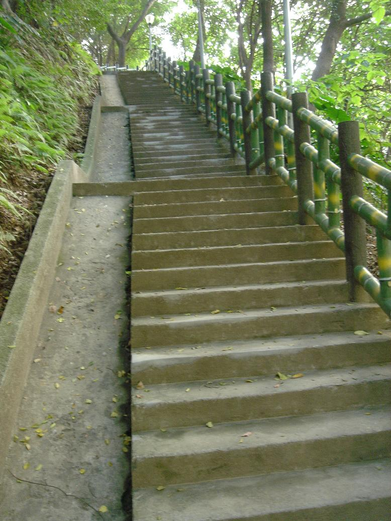 台北縣中和市員山公園的登山步道與左側雨水道。Bân-lâm-gú: Tâi-pak-kuān Tiong-hô-tshī Înn-suann-kong-hn̂g ê ting-suann pōo-tō í tsó-tshik hōo-tsúi-tō.